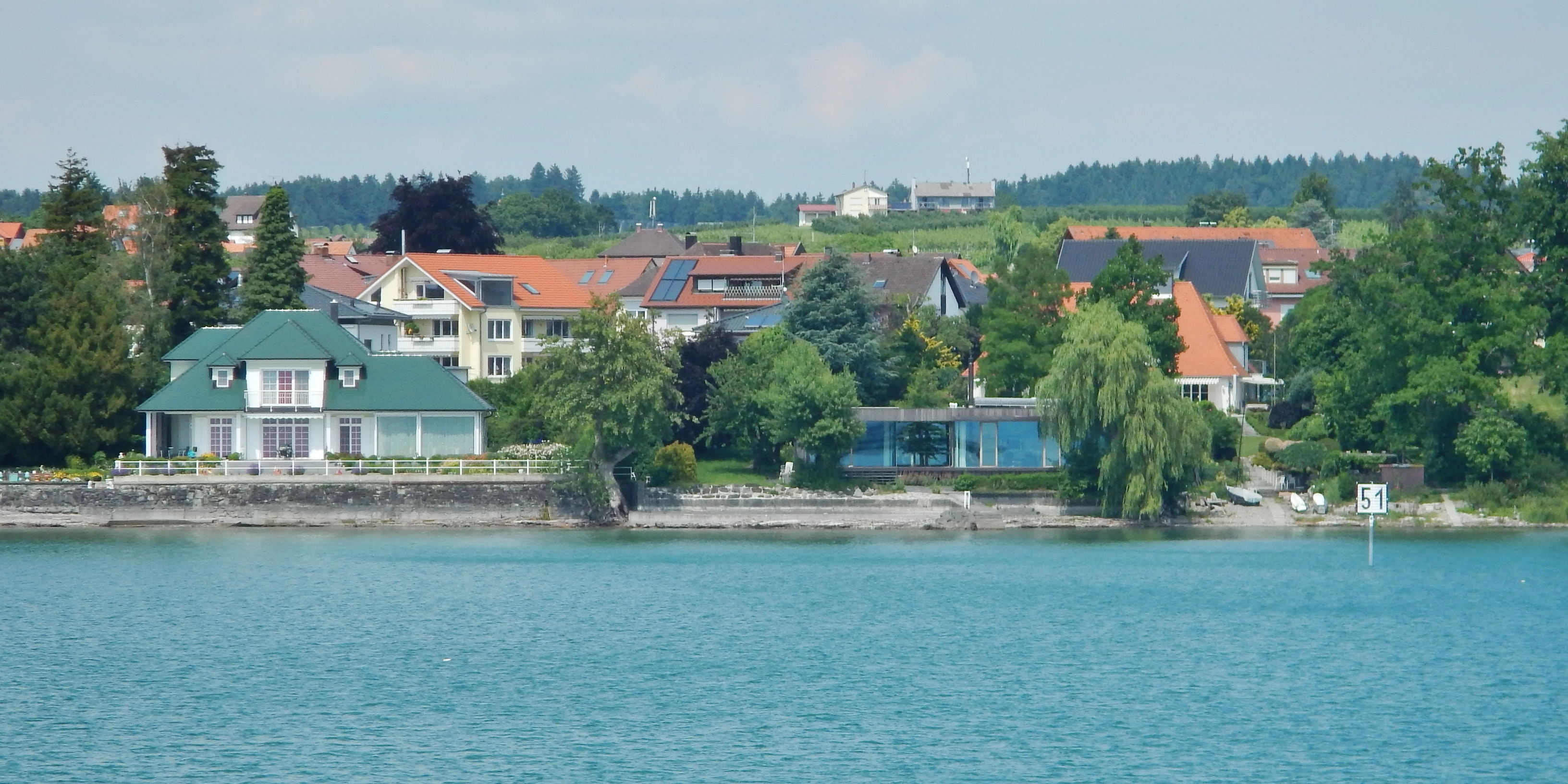 Häuser in Nonnenhorn